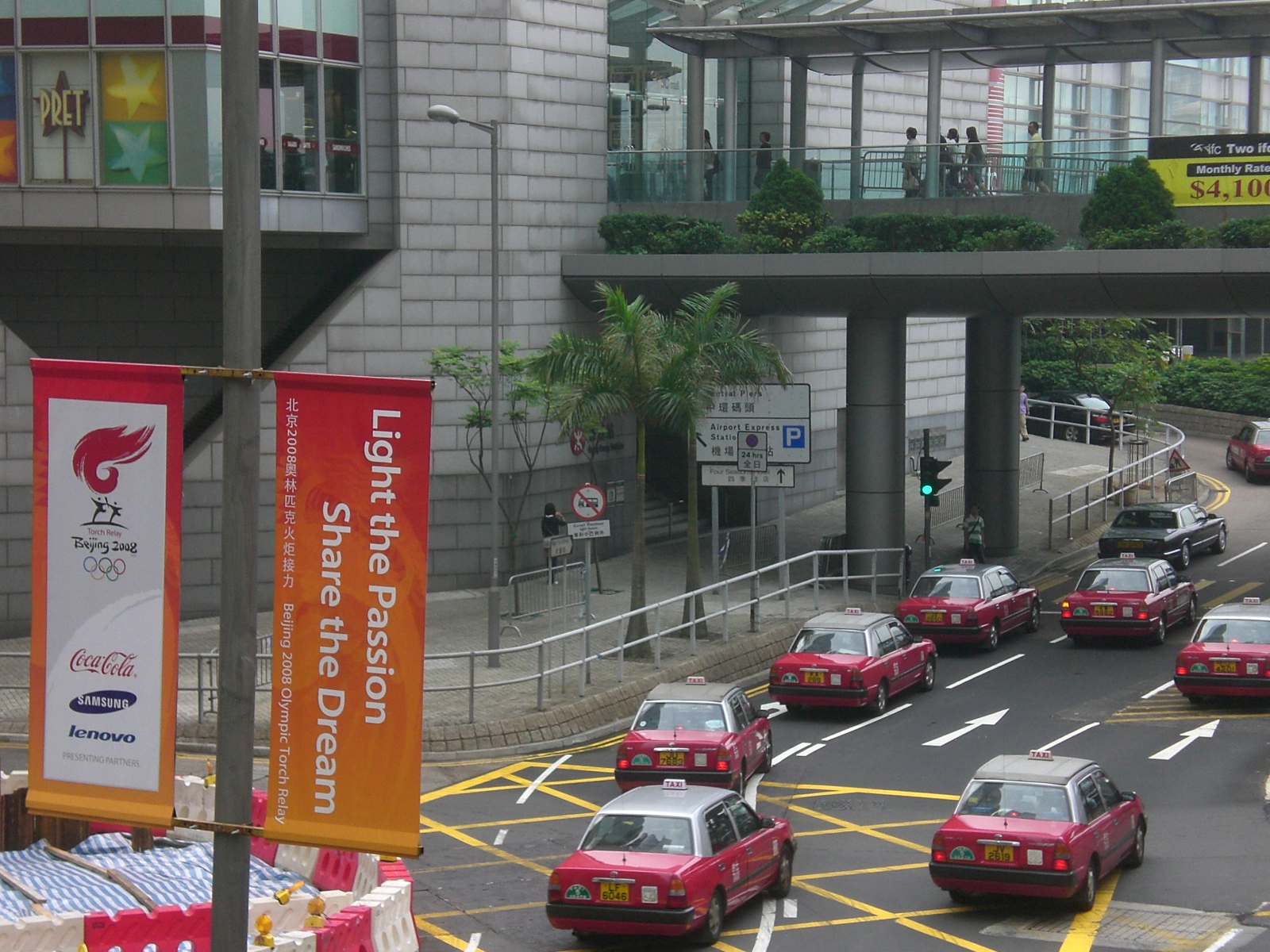 2008年夏季奧林匹克運動會香港區火炬接力